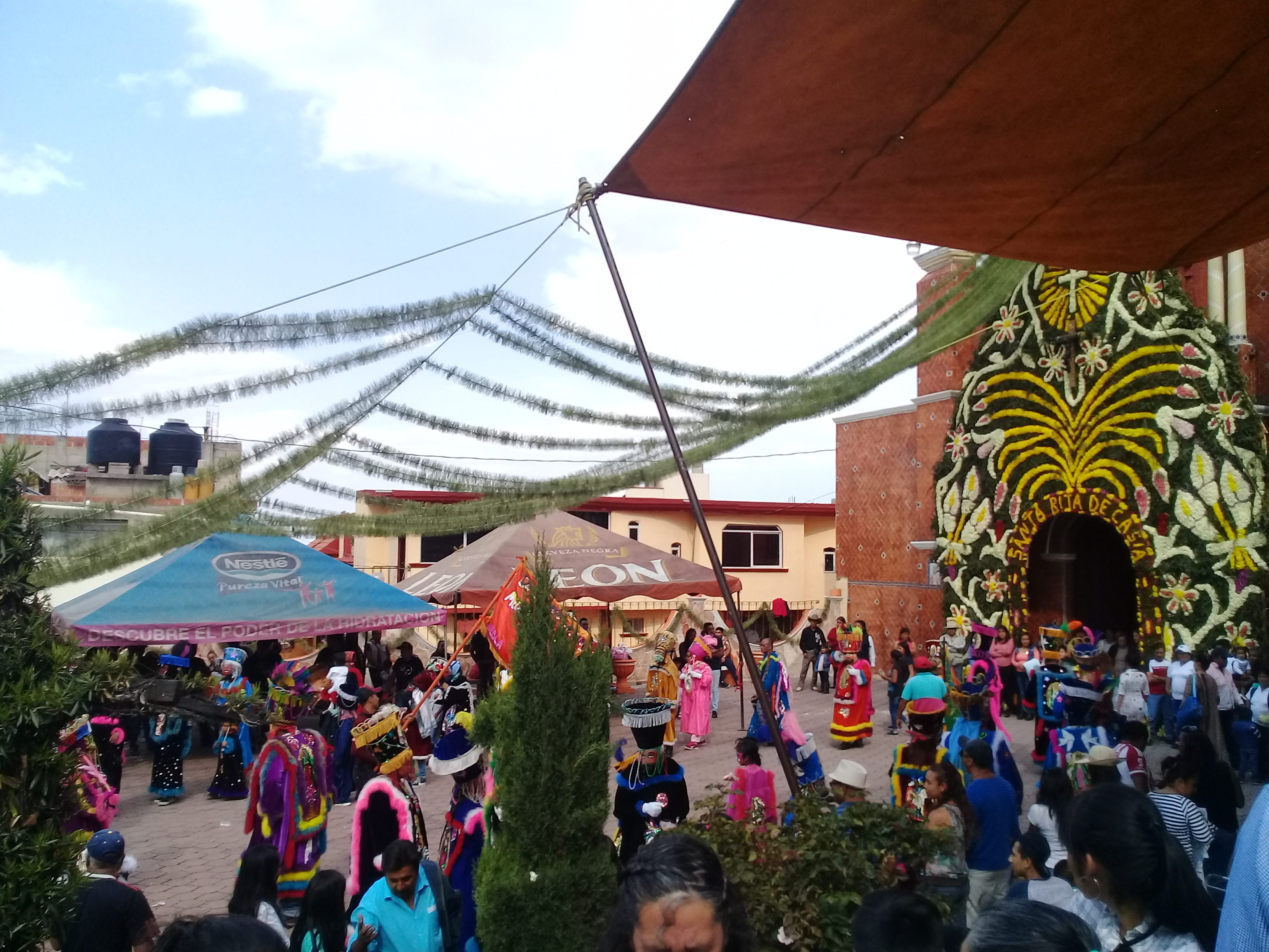 Fiestas patronales en Santa Rita Tlahuapan, Puebla